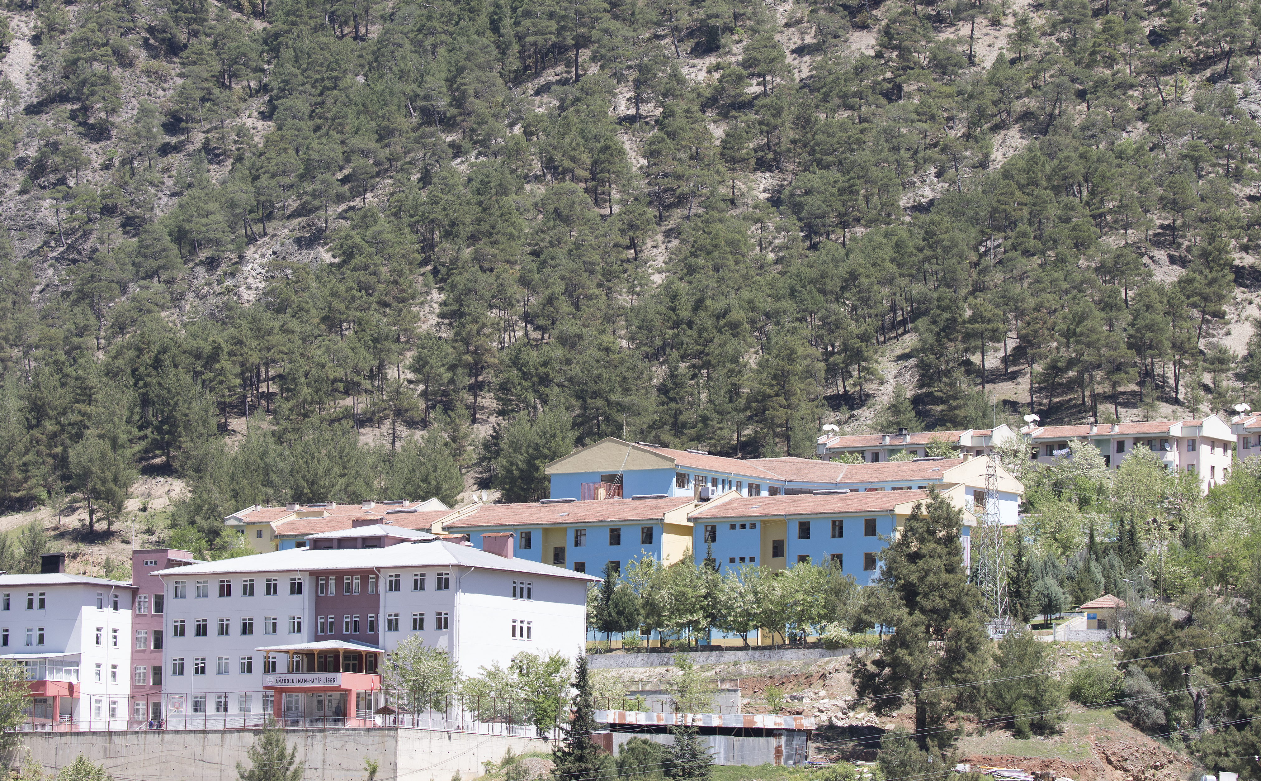 Feke Anadolu İmam Hatip Lisesi ve Lütfiye Ayşe Baytok Yatılı Bölge Ortaokulu. Feke - Adana, Türkiye.